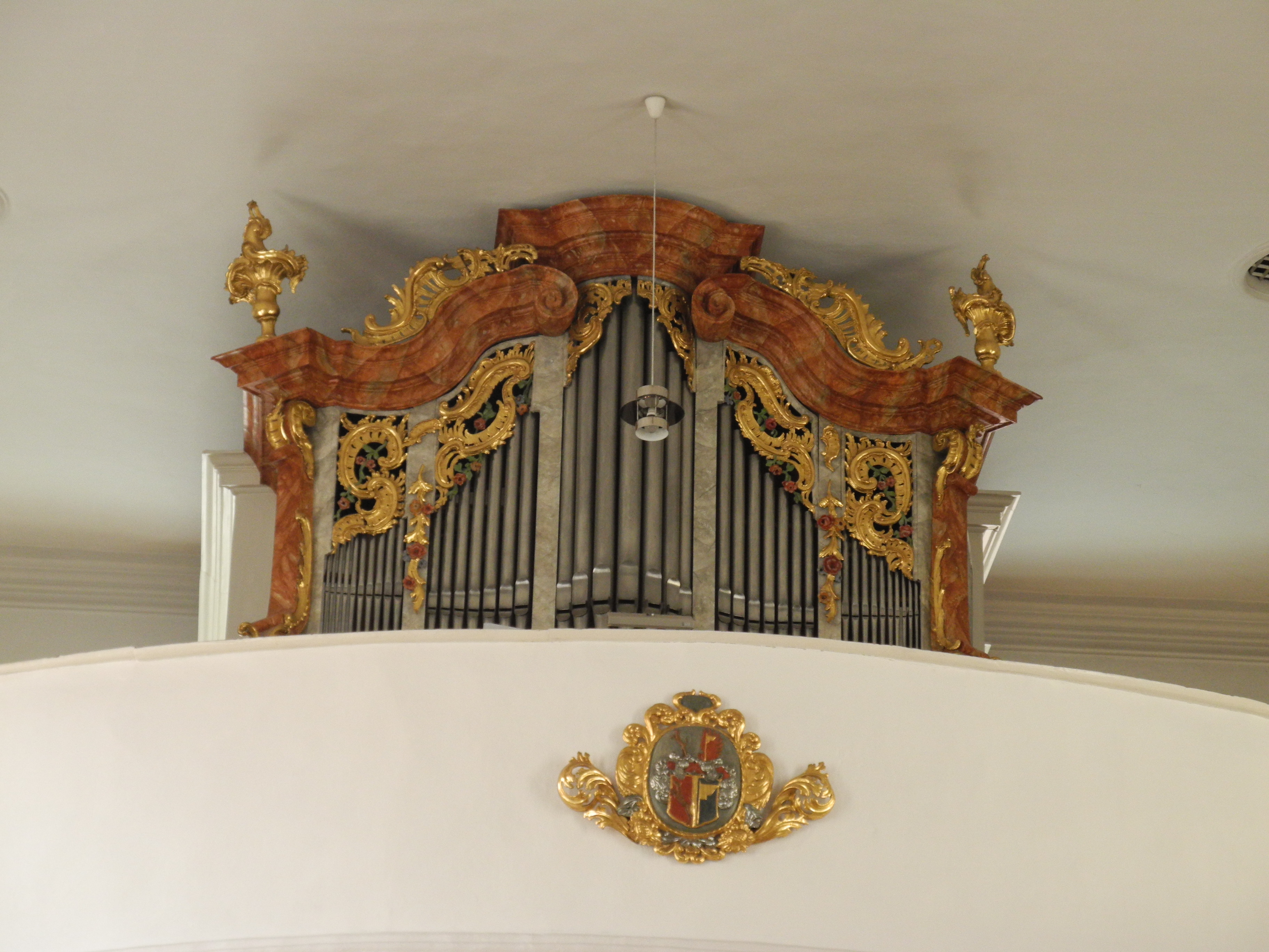 Werk Nenninger 1977 (21/II/P)